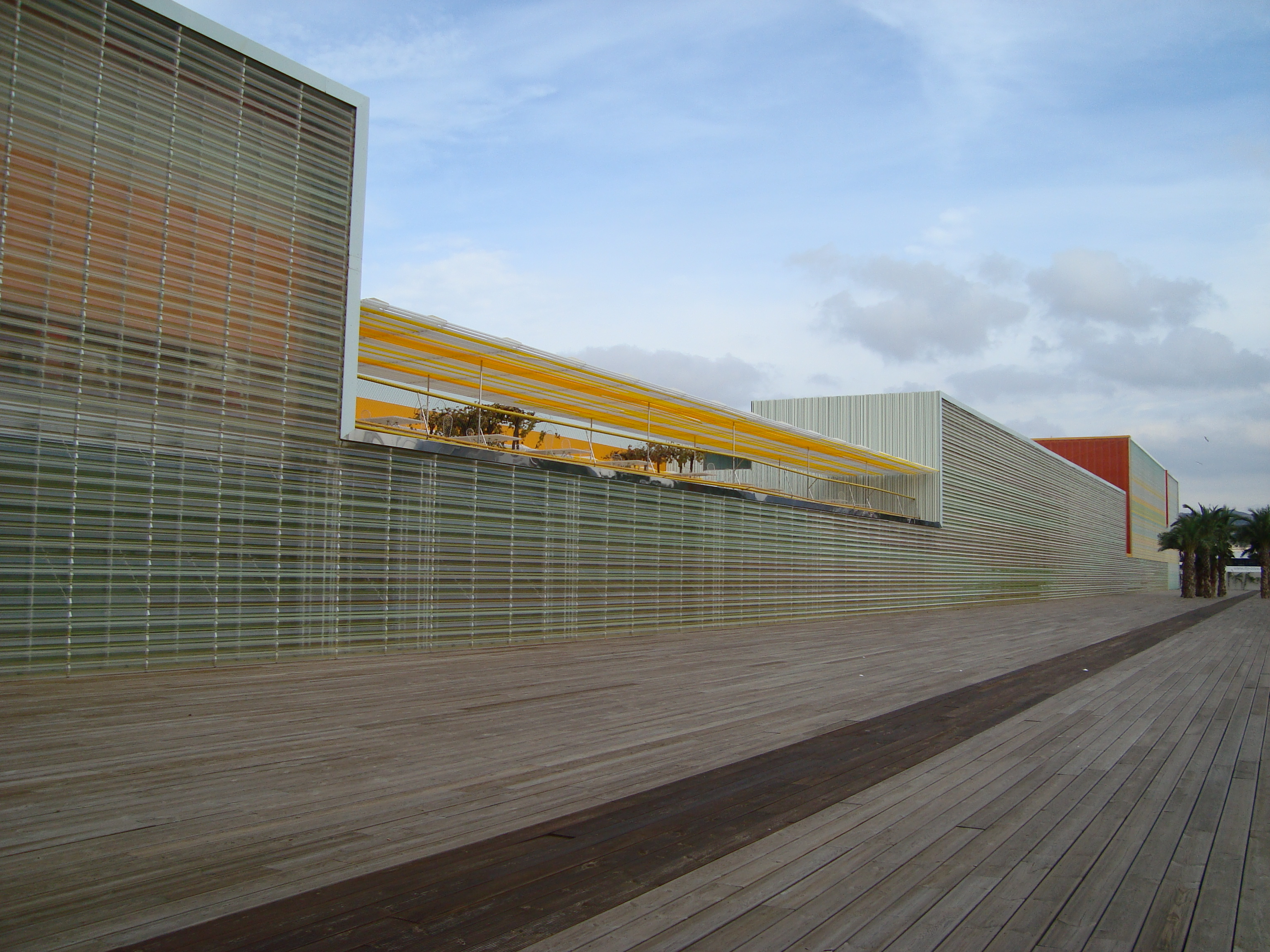 Cartagena